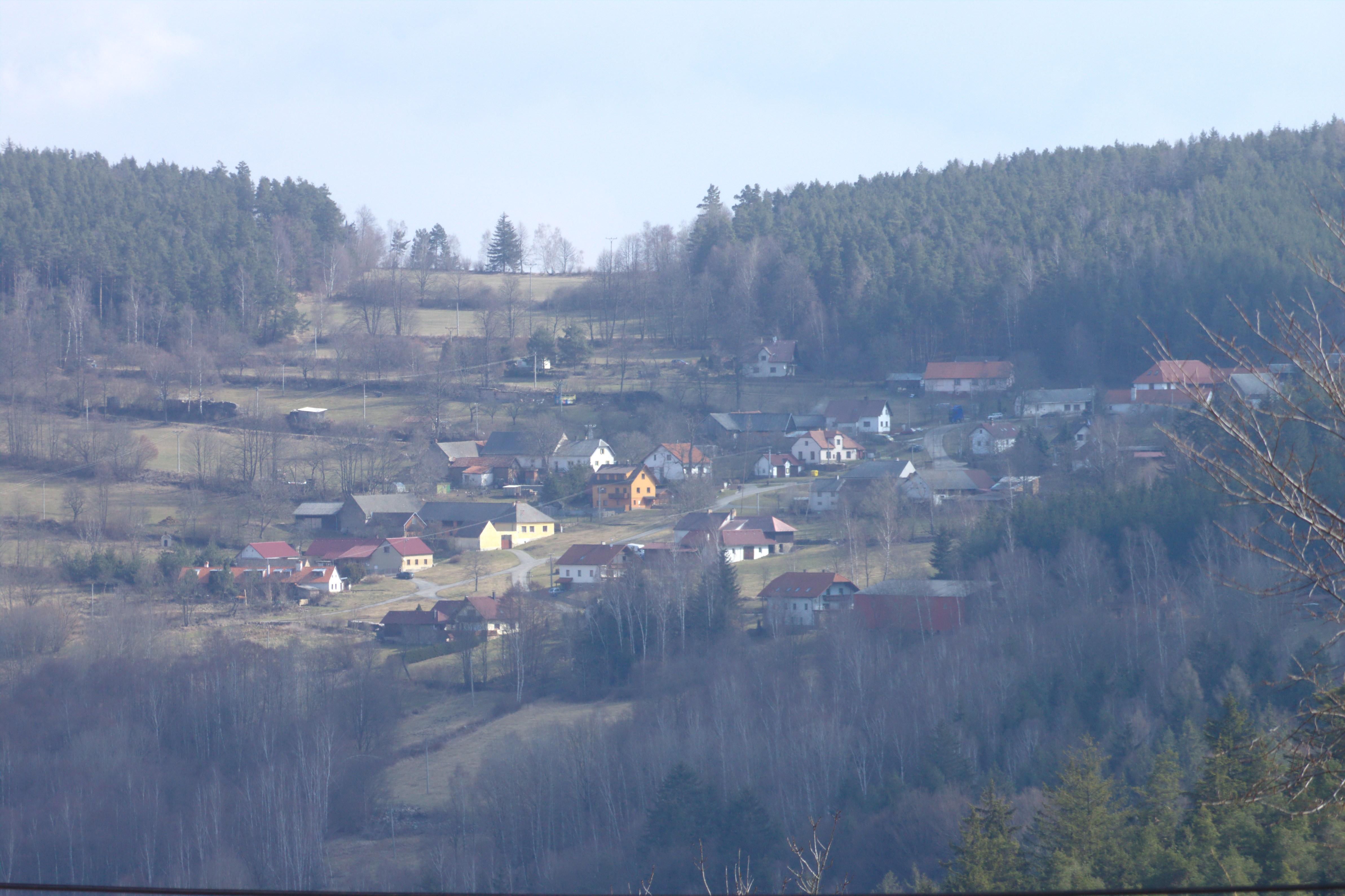 Pohled na Kralovice z vesnice Lazišťka Project: Fotíme Česko